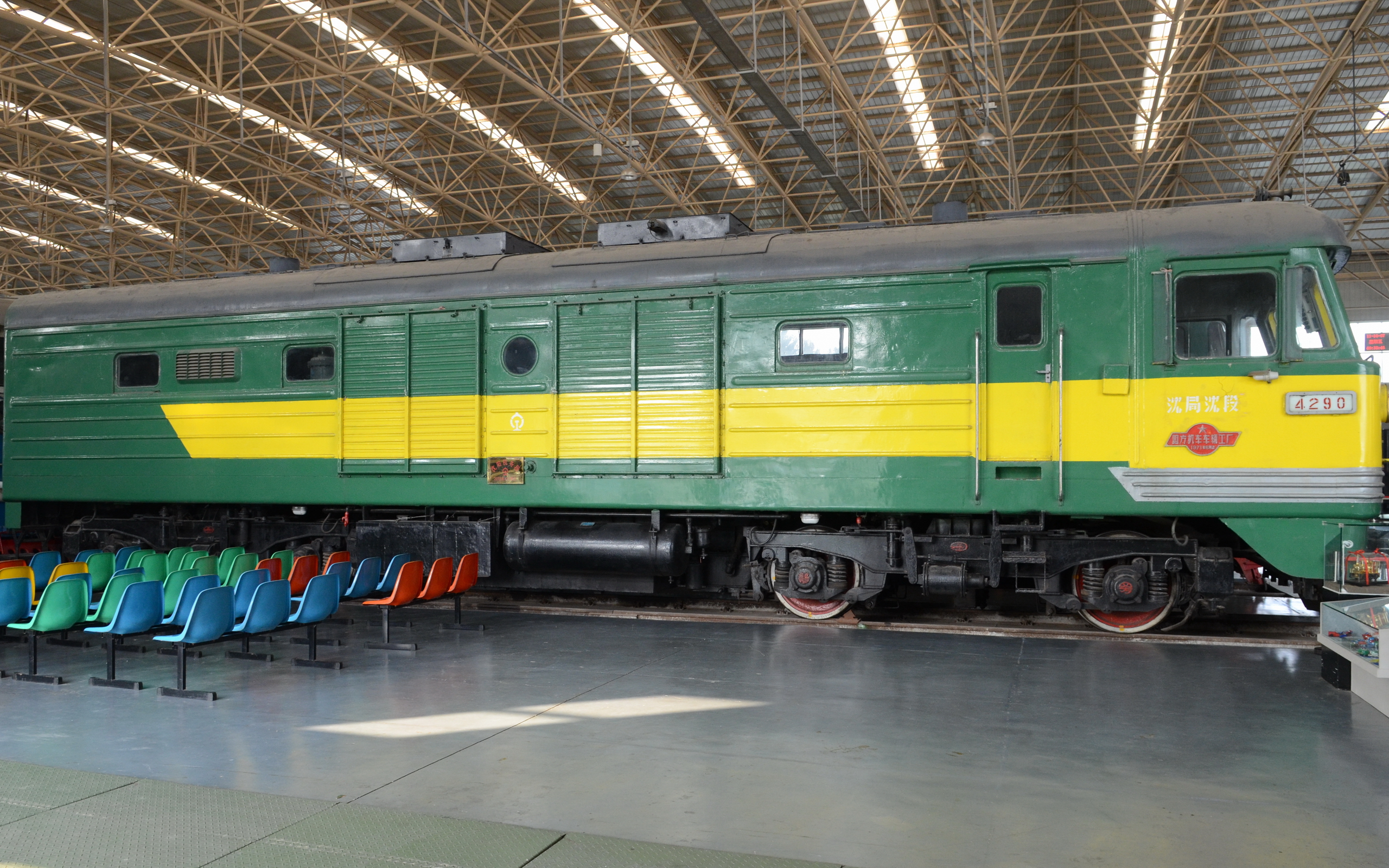 东方红1型4290号柴油机车